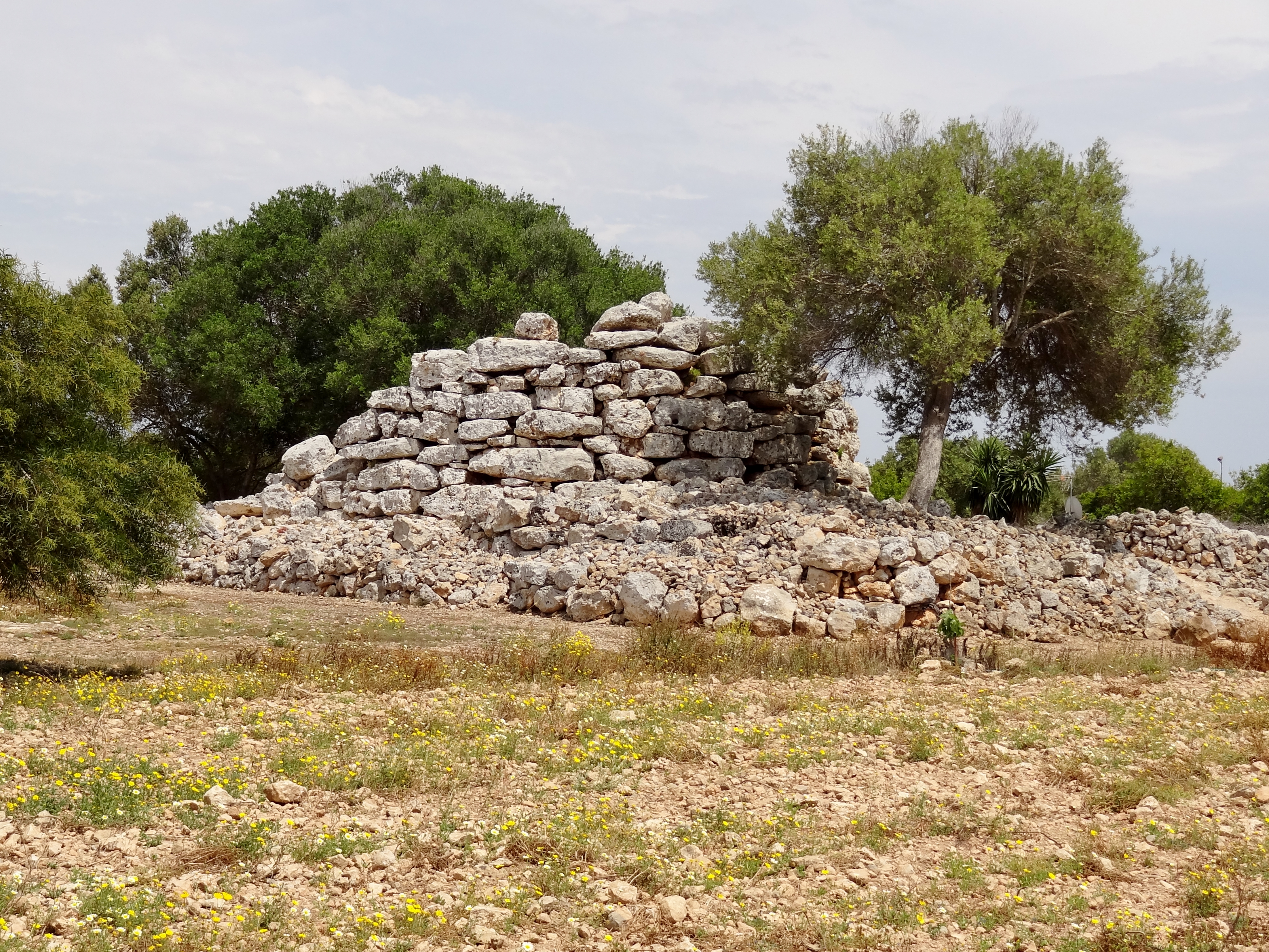 Runder Talaiot Nr. 1 in der Ausgrabungsstätte von Capocorb Vell, Gemeinde Llucmajor, Mallorca, Spanien